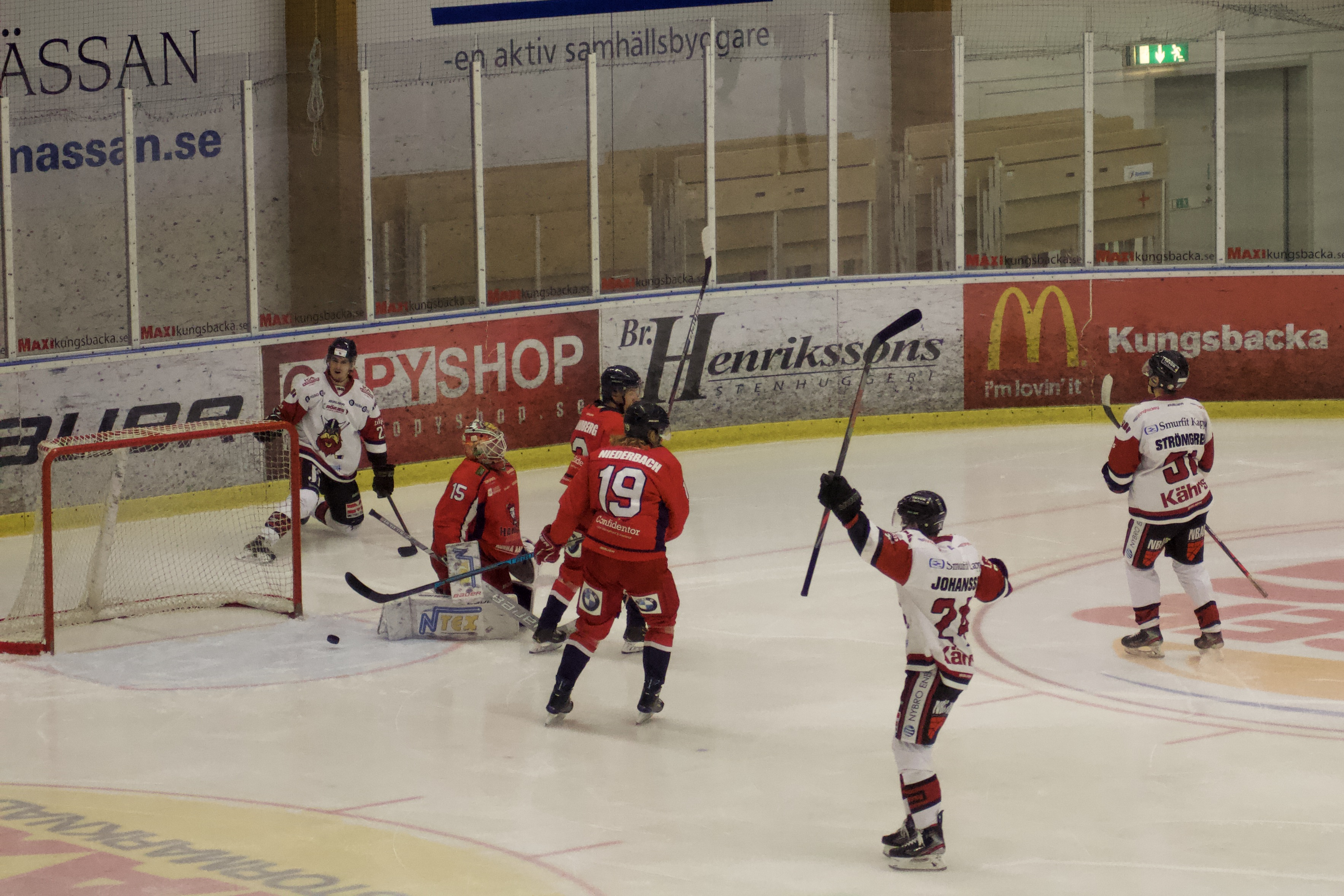 Matchinfo